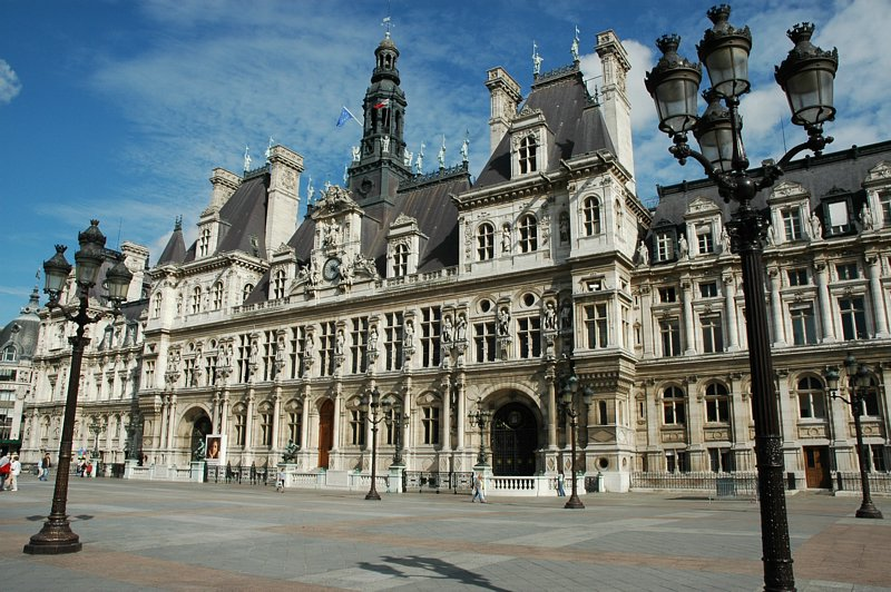 Hotel de Ville Photo